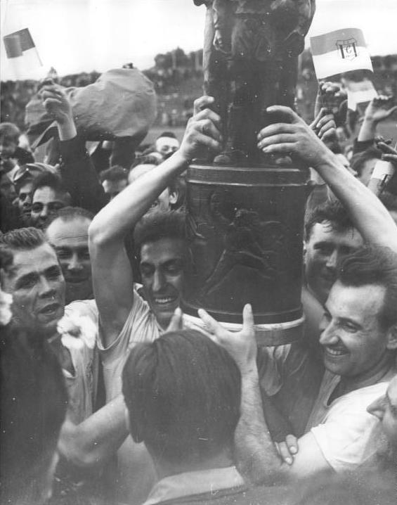 Zentralbild Gahlbeck 11.6.1962 SC Chemie Halle gewann FDGB-Pokal Im Karl-Marx-Städter Ernst-Thälmann Stadion gewann der SC Chemie Halle am 10.6.62 das Fußballendspiel um den FDGB-Pokal gegen den SC Dynamo Berlin mit 3:1. UBz: Die glücklichen Spieler des SC Chemie Halle nach dem Spiel mit dem FDGB-Pokal. In der Mitte K. Hoffmann.